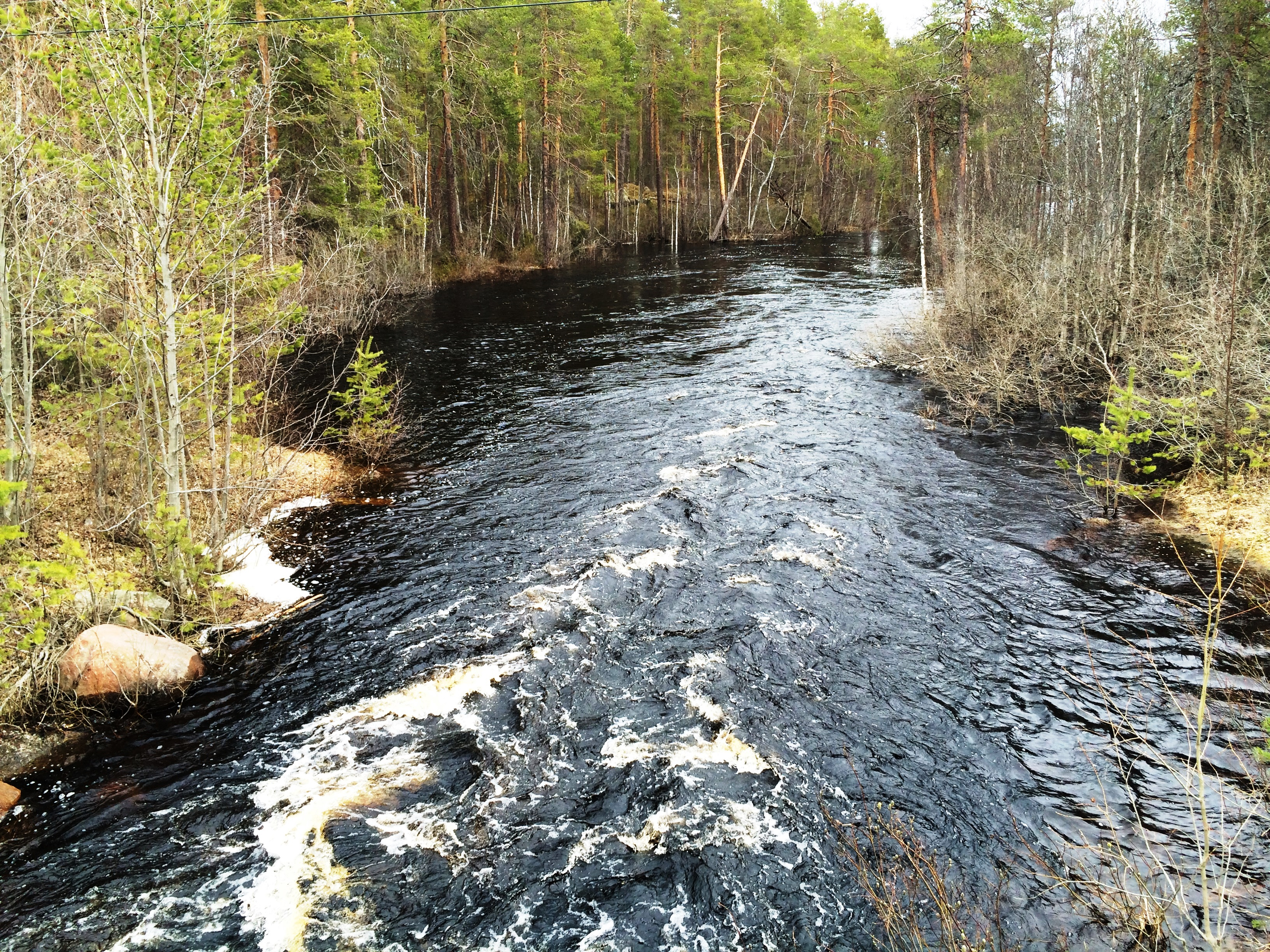 река Нурдас